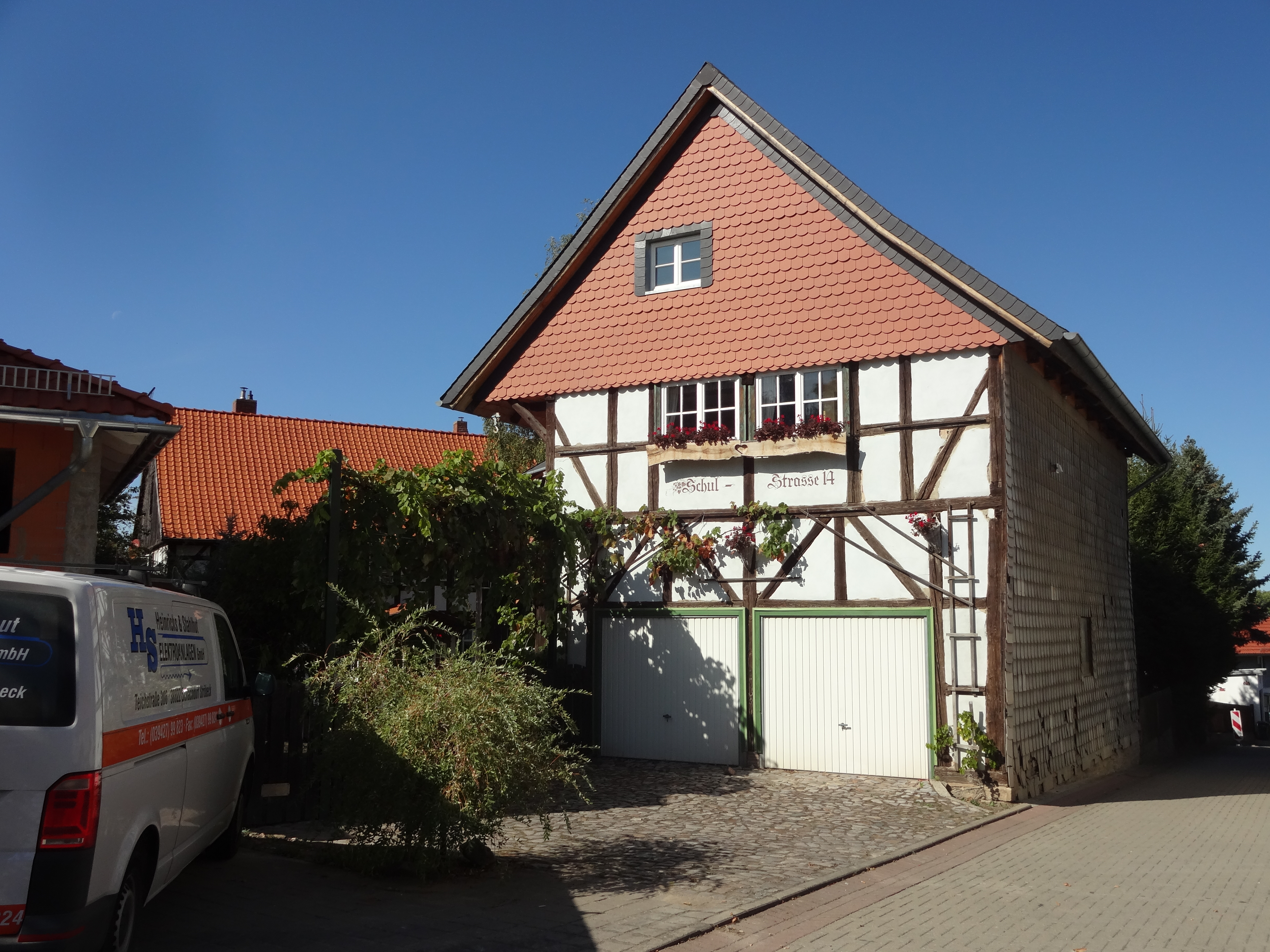 denkmalgeschützter Bauernhof in der Schulstraße 14 in Drübeck